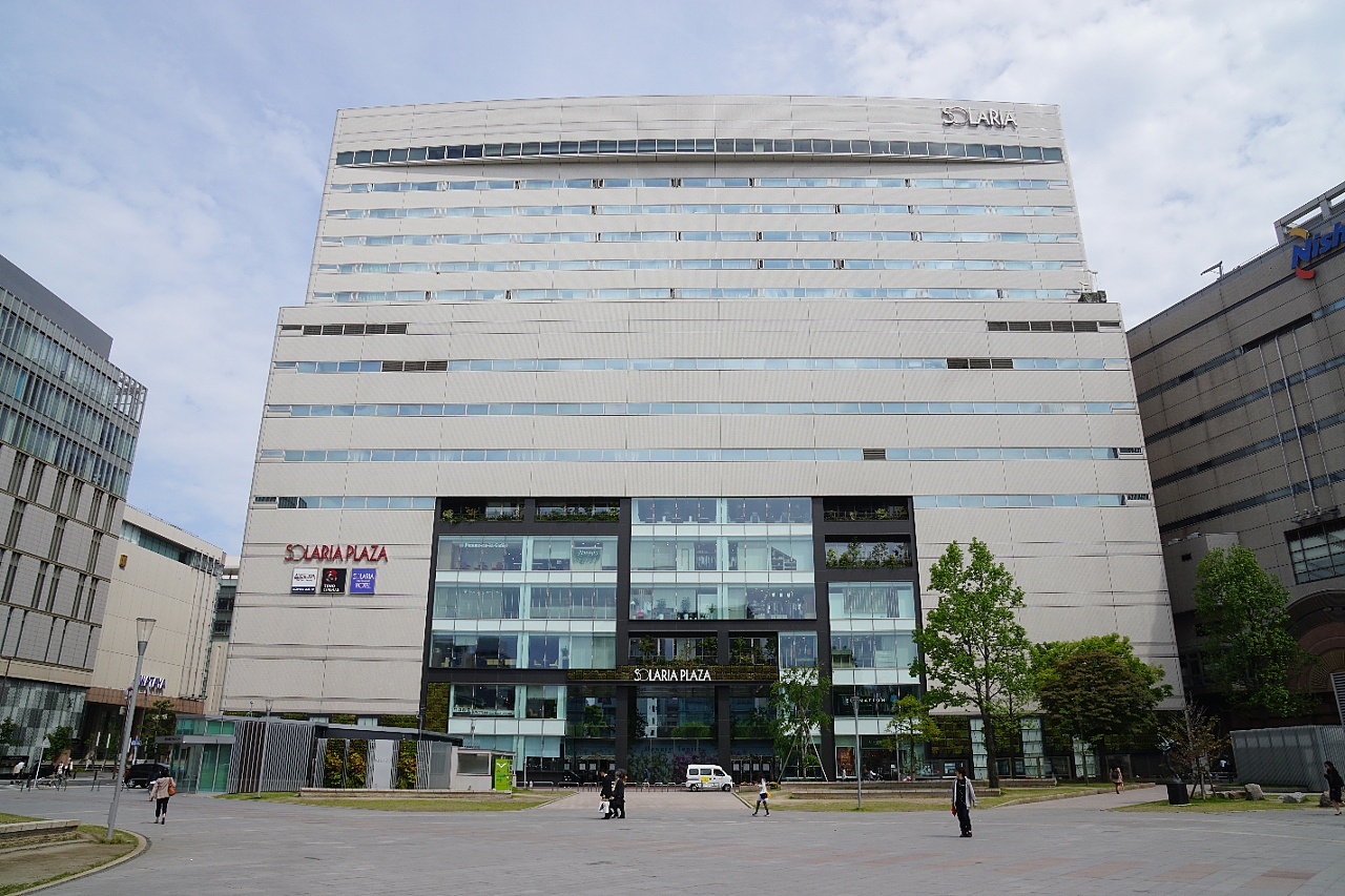 ソラリアプラザ（警固公演側）・2015年4月リニューアル後エントランス